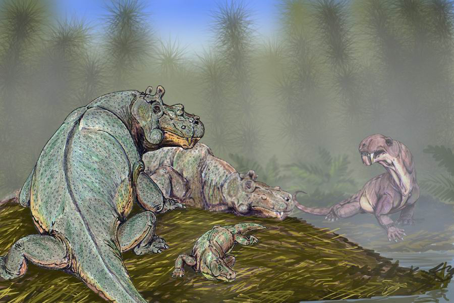 Ocher_fauna, Estemmenosuchus and Ivantosaurus, autor - Bogdanov,2006